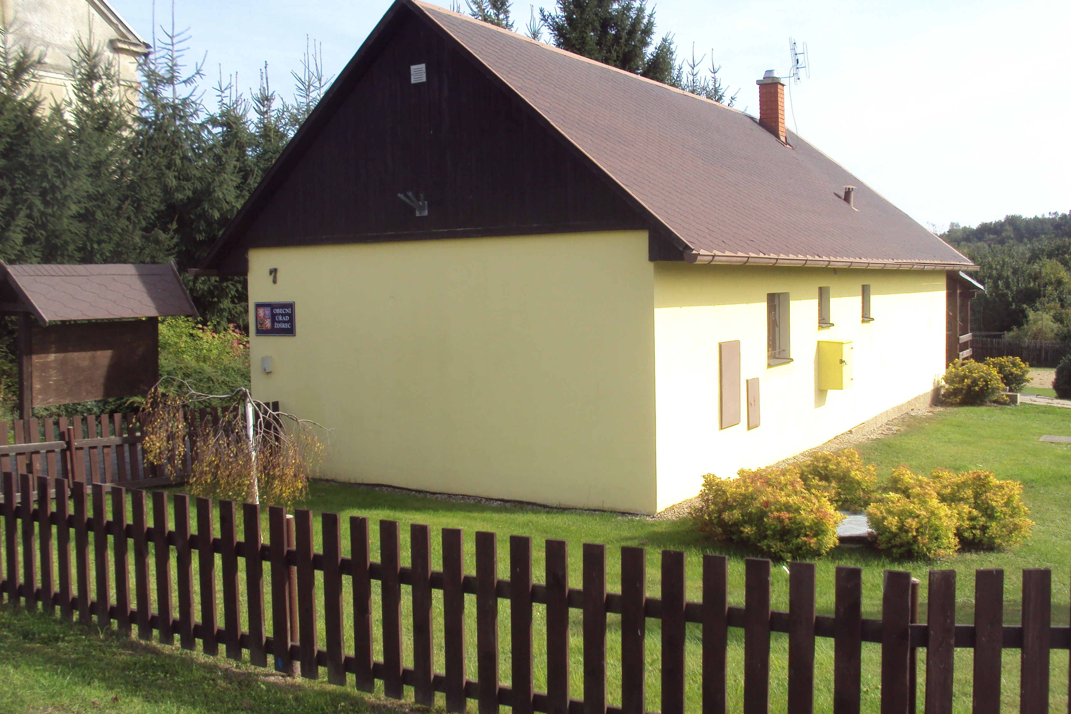 Dům v obci